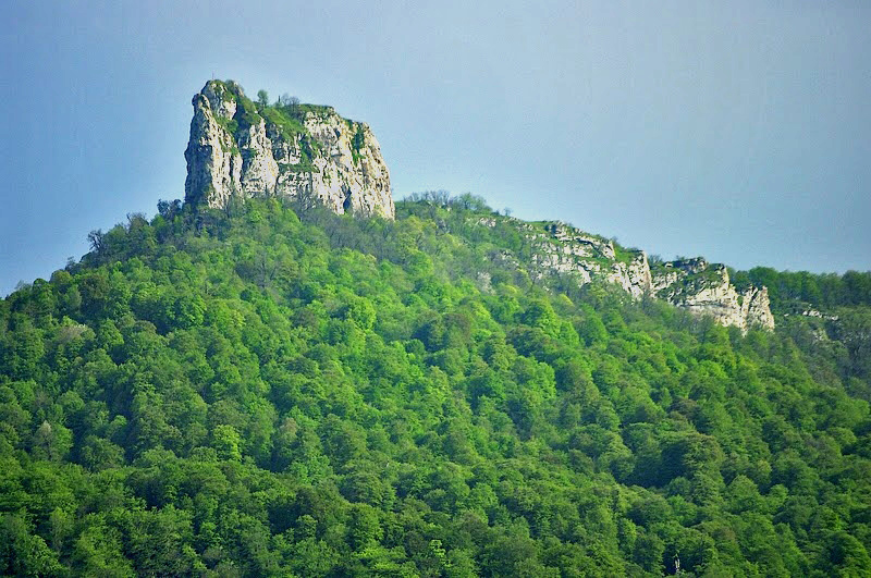 Качахакаберд4